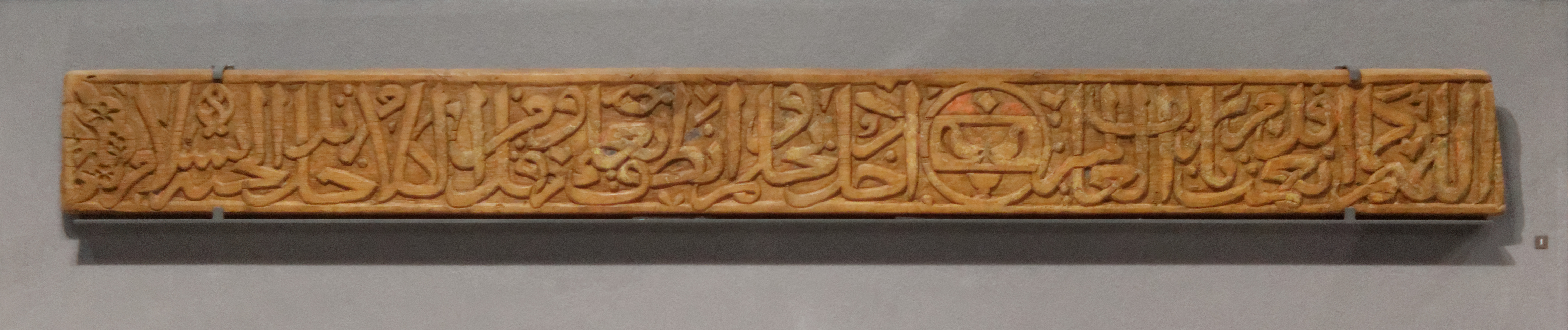 Le texte est d’inspiration coranique. Il est interrompu par un blason tripartite, celui du sultan Jaqmaq, employé par plusieurs de ses émirs. La multiplication des registres horizontaux barrant les hampes des lettres est caractéristique de la graphie cursive thuluth d’époque mamluke. Cette frise a été restaurée grâce au mécénat de Frédéric Jousset